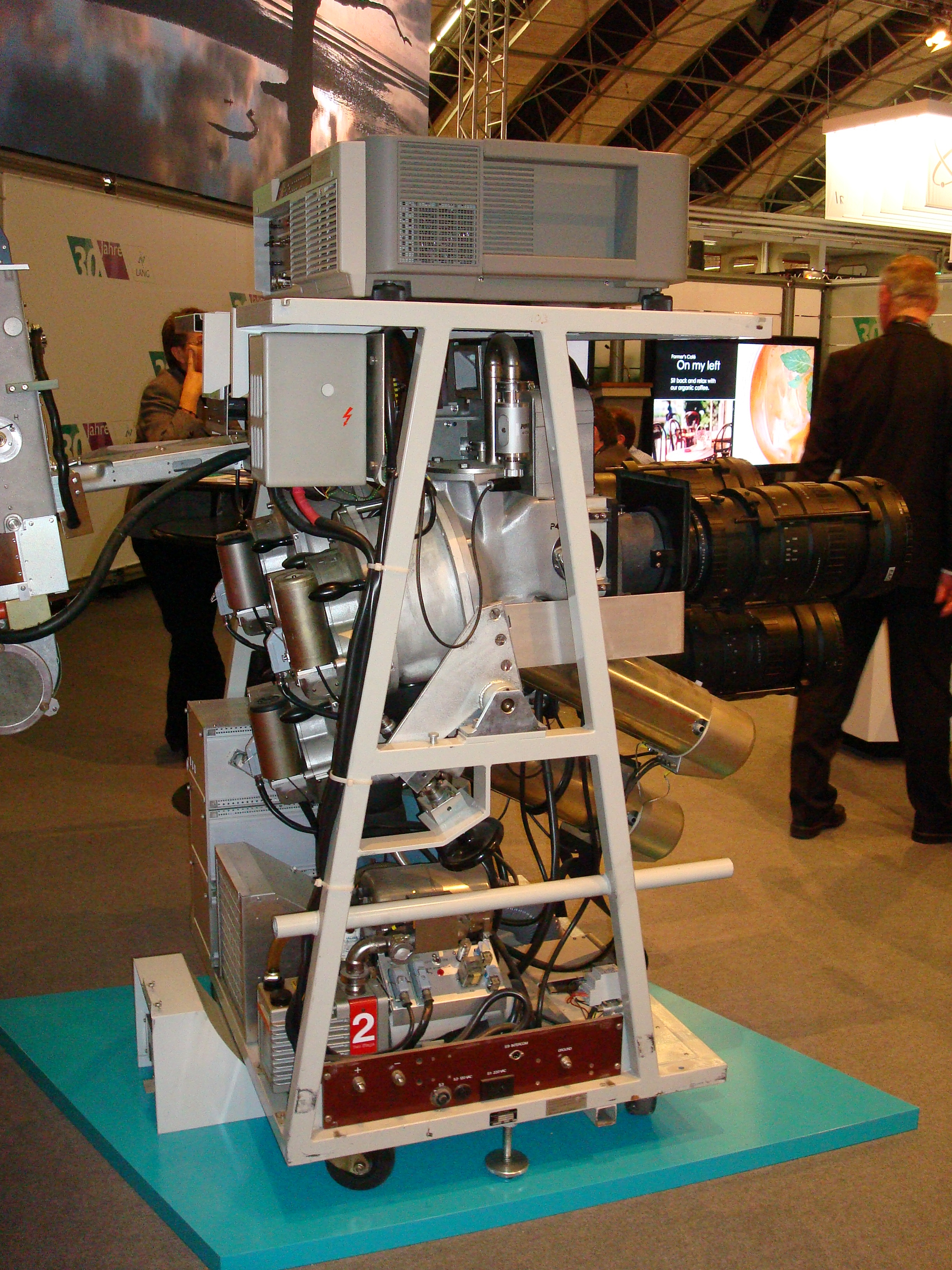 Eidophor side view